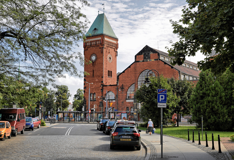 Уроцлаўскія замалёўкі